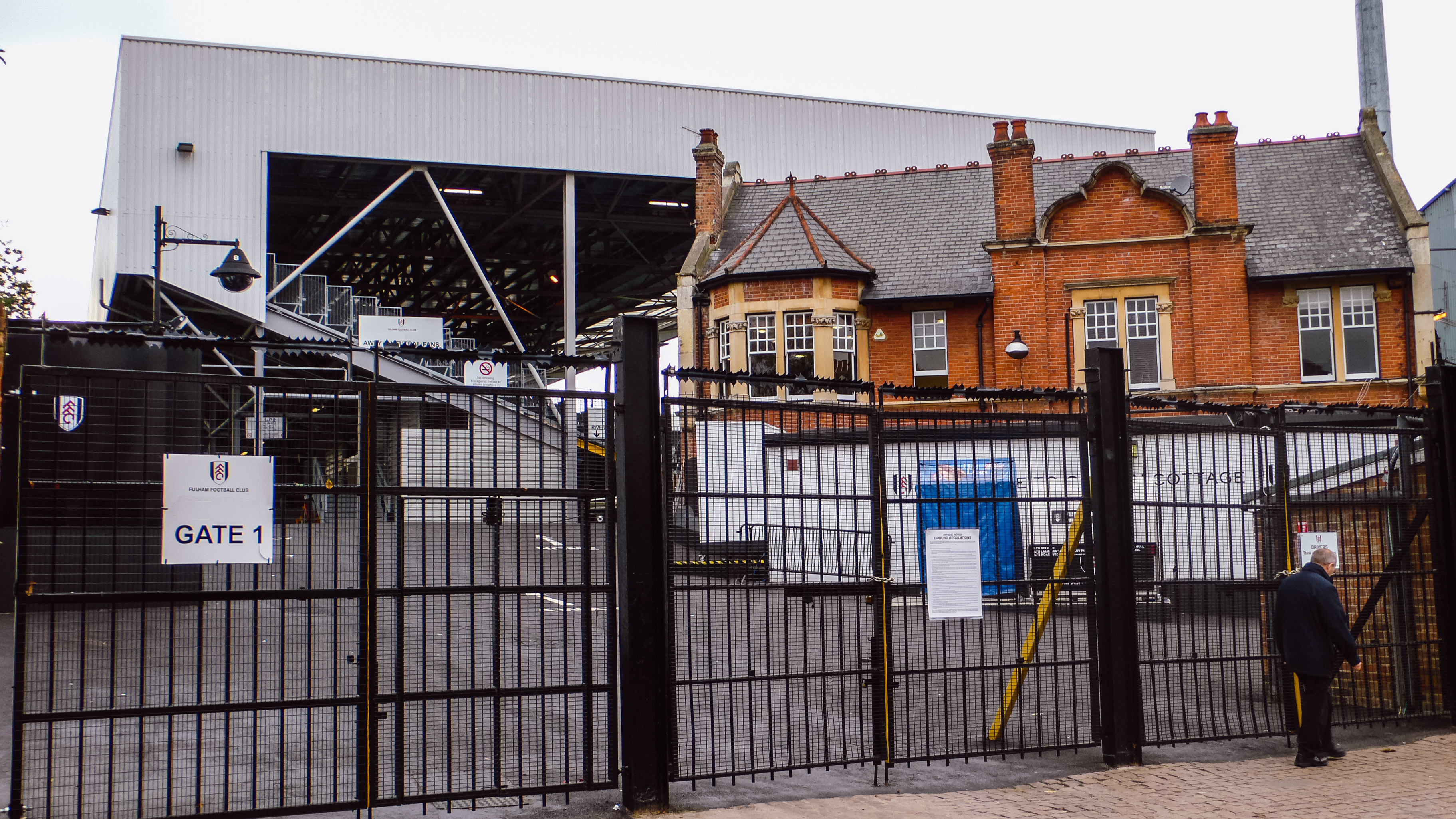 Fullham FC Haupteingang